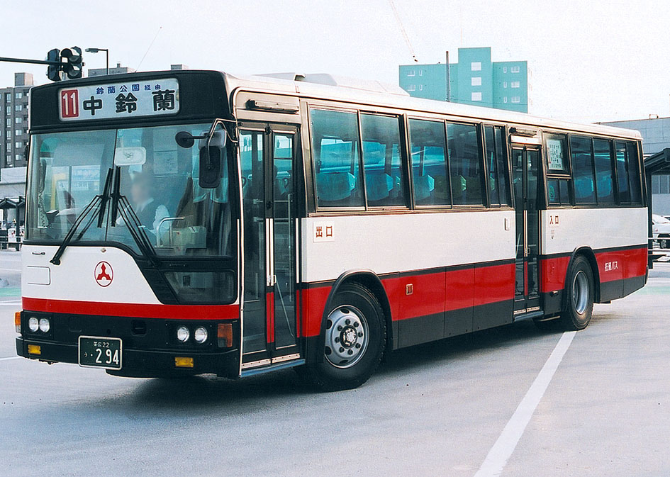 北海道拓殖バス 三菱ふそう・エアロスターMP